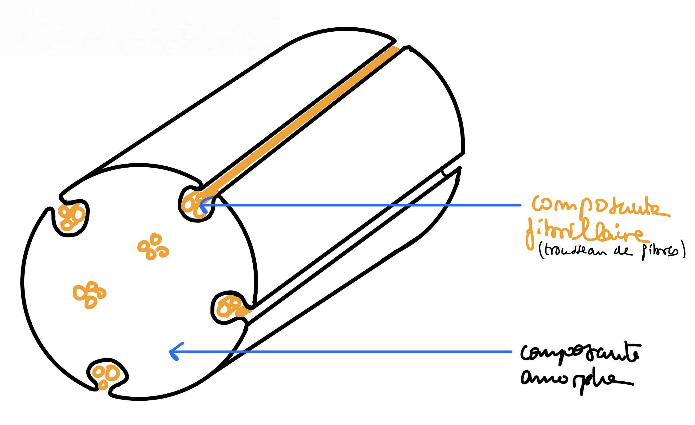 Schéma d’une fibre élastique mature, on distingue la composante fibrillaire et la composante amorphe de la fibre